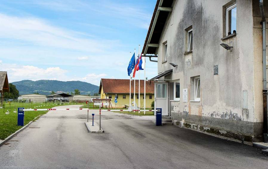 Vojašnica slovenske Teritorialne obrambe